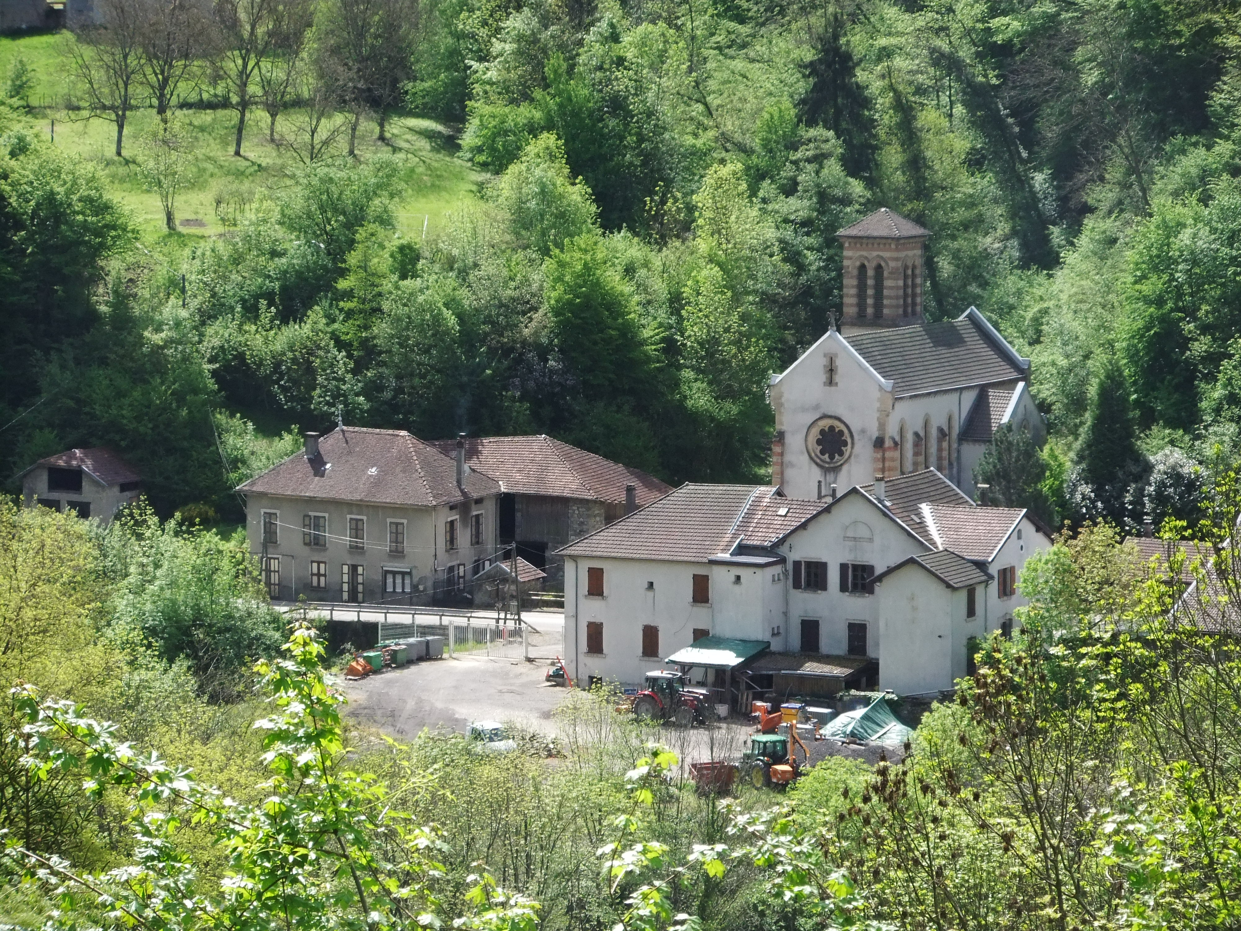 Bourg de Morêtel-de-Mailles, Isère, Rhône-Alpes, France. Photographie du lieu dit « le Champ-du-Pont », où sont situées l'église et la mairie de la commune, jouxtant la commune de Saint-Pierre-d'Allevard, sur laquelle sont situés les deux bâtiments à gauche de l'église sur la photo. Le ruisseau du Taillou sert de limite entre les deux communes.